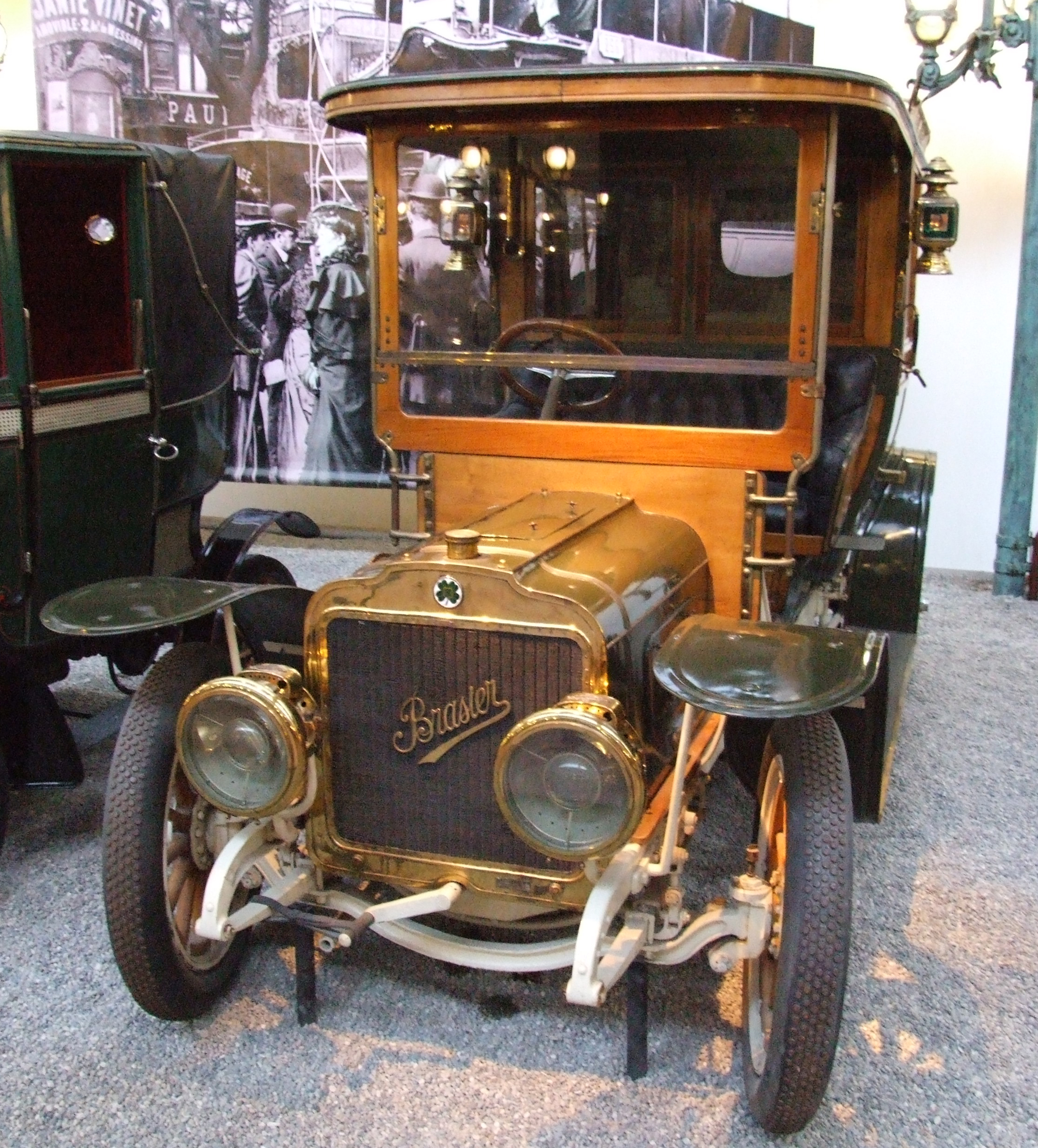 Brasier Coupe Chaffeur KD, 1908, 4 Zylinder, 24 PS, 3397 ccm, Cité de l’Automobile – Musée National – Collection Schlumpf, Mulhouse, Frankreich